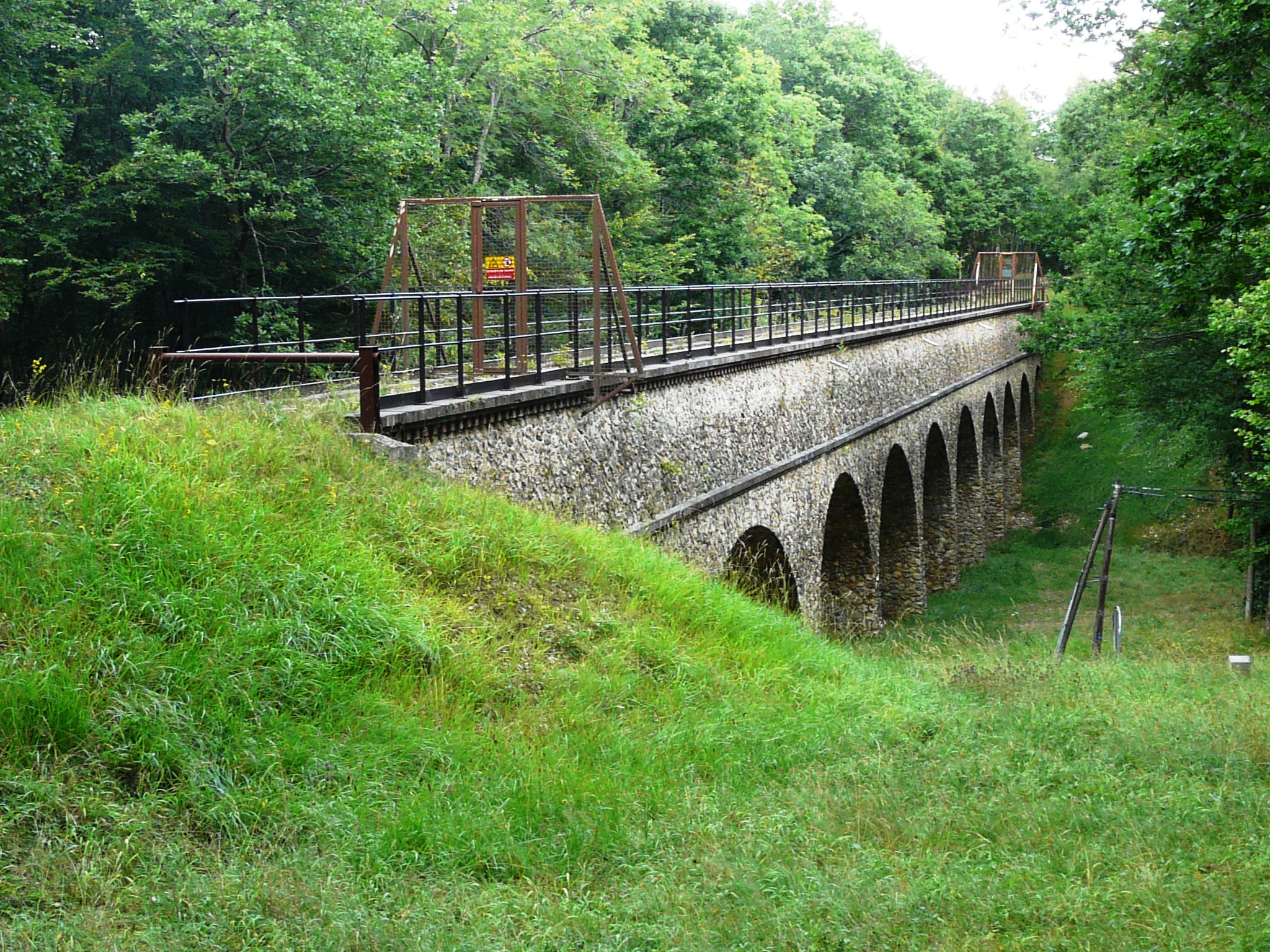 pont aqueduc de l'Avre (arcades de Marigny), Prudemanche, Eure-et-Loir (France).